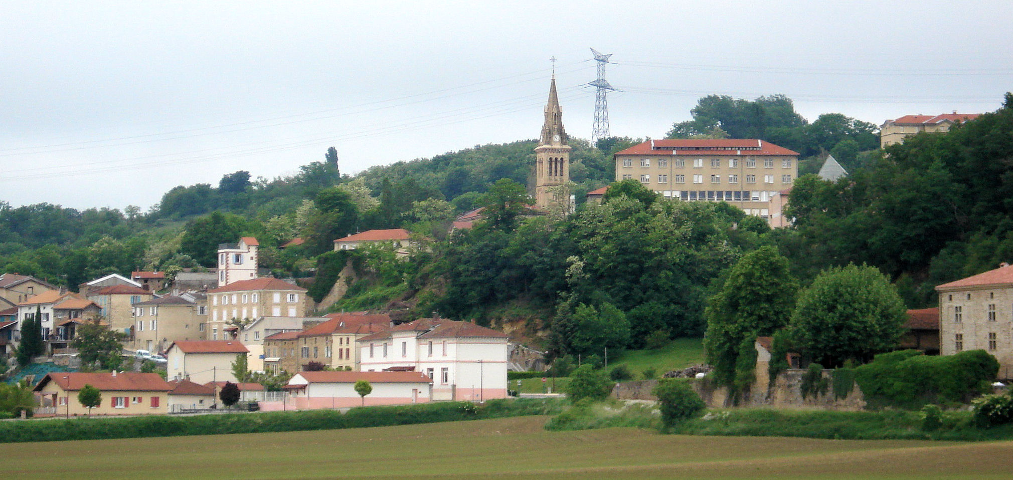 Châteauneuf-de-Galaure dans la Drôme